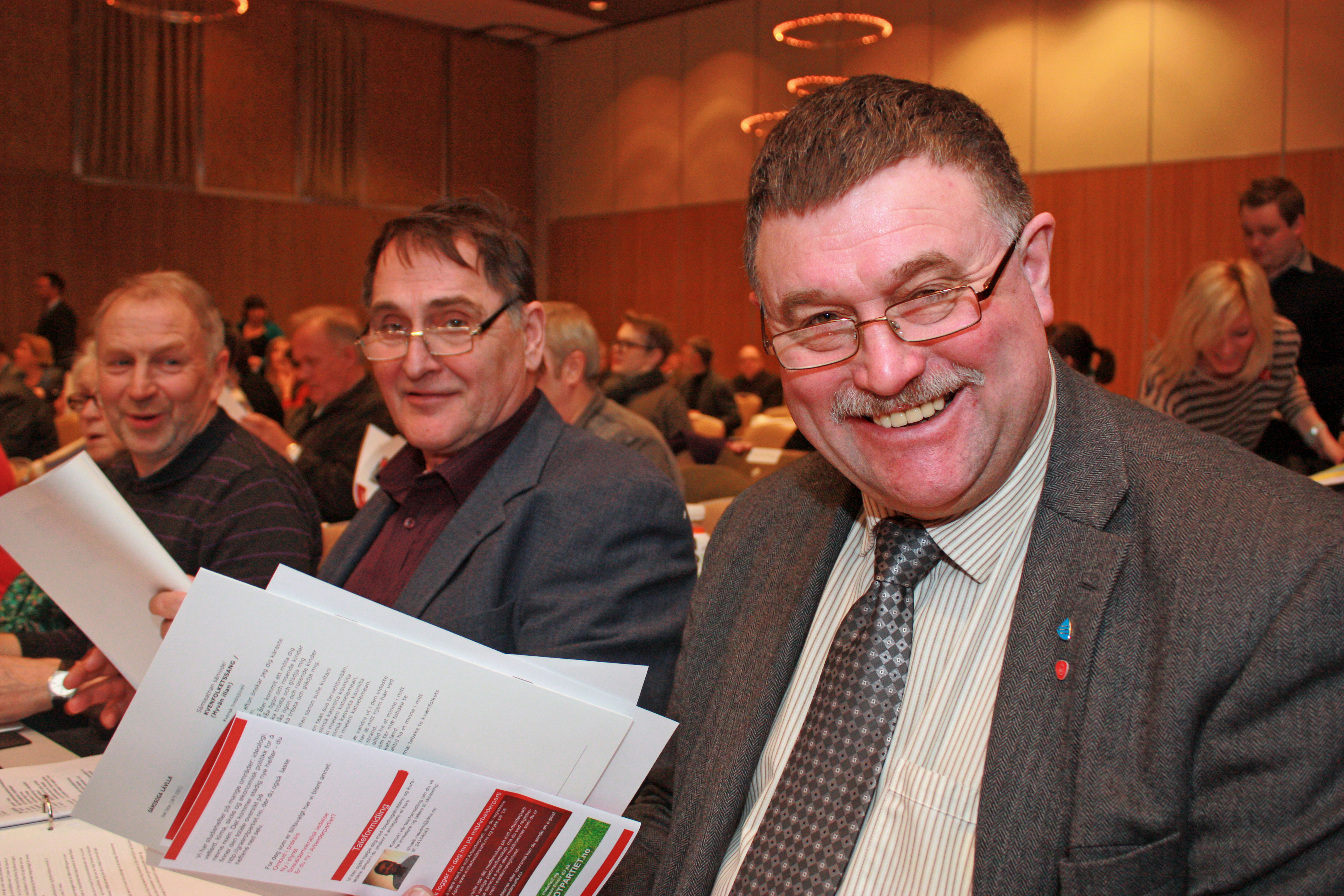 Martin Ness, Arbeiderparipolitiker, tidl ordfører i Lenvik